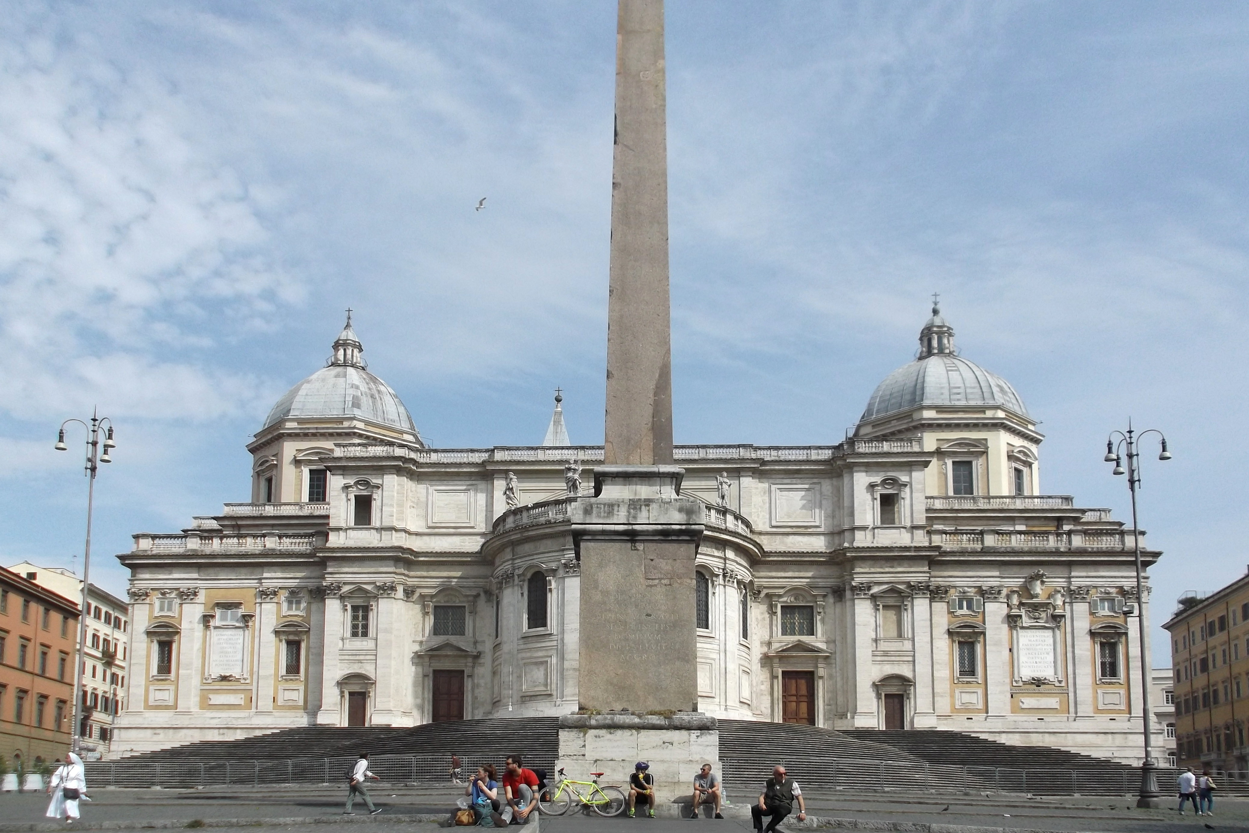 Basilica di Santa Maria Maggiore Native nameBasilica di Santa Maria MaggioreLocationRome, ItalyCoordinates41° 53′ 51″ N, 12° 29′ 55″ E Established432 CEWebsite control VIAF: 317121634 LCCN: n88227199 GND: 4228647-5 SUDOC: 079293220 WorldCat Apse of Basilica di Santa Maria Maggiore in Rome, Italy